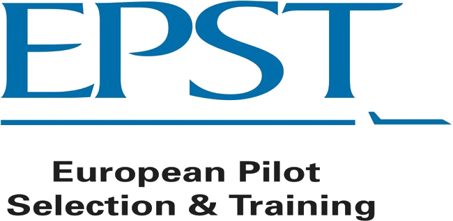 Logo van European Pilot Selection & Training. (EPST)